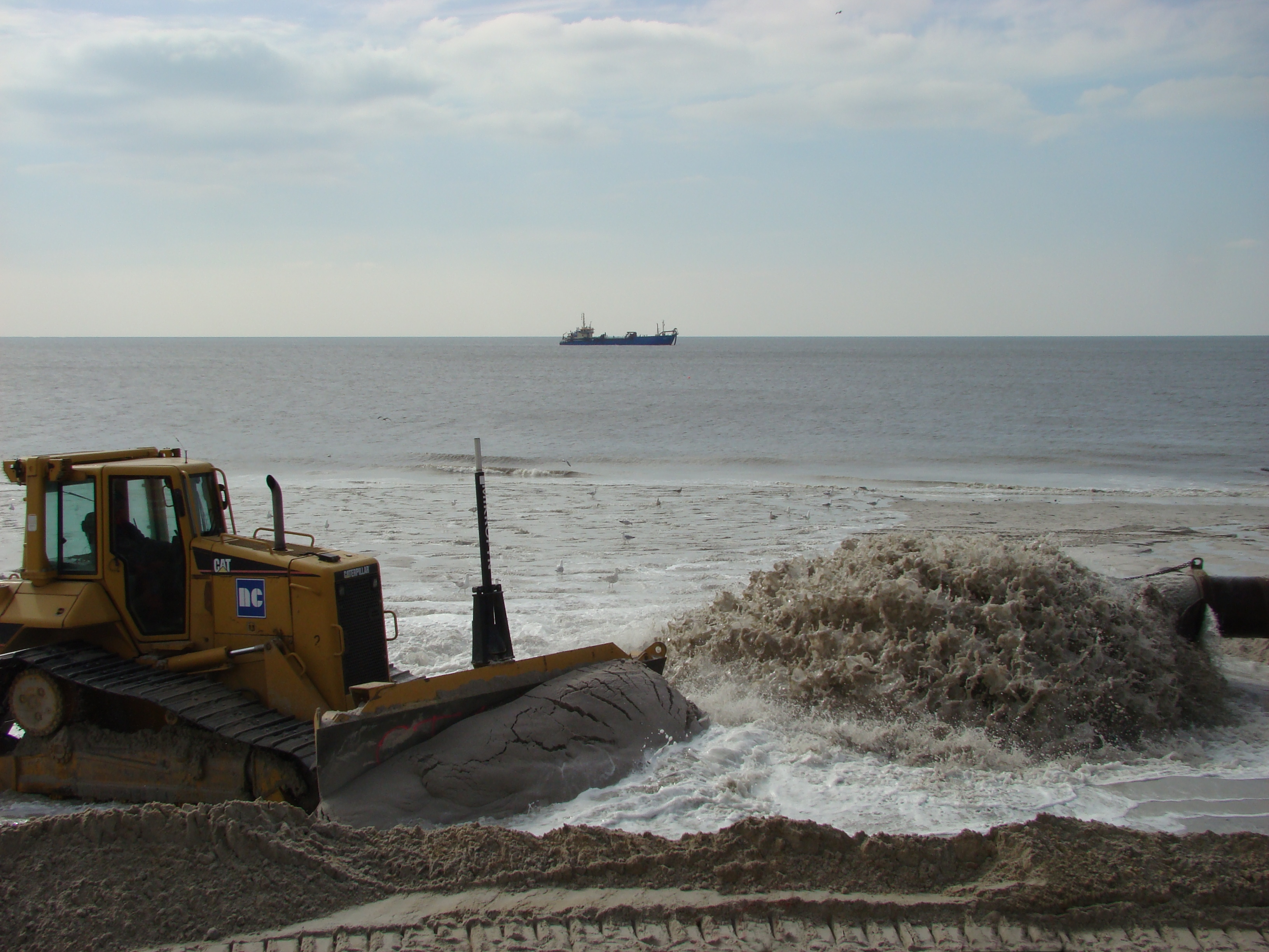 Sandaufspülung und die Verteilung am Küstenstreifen, auf See der Hopperbagger